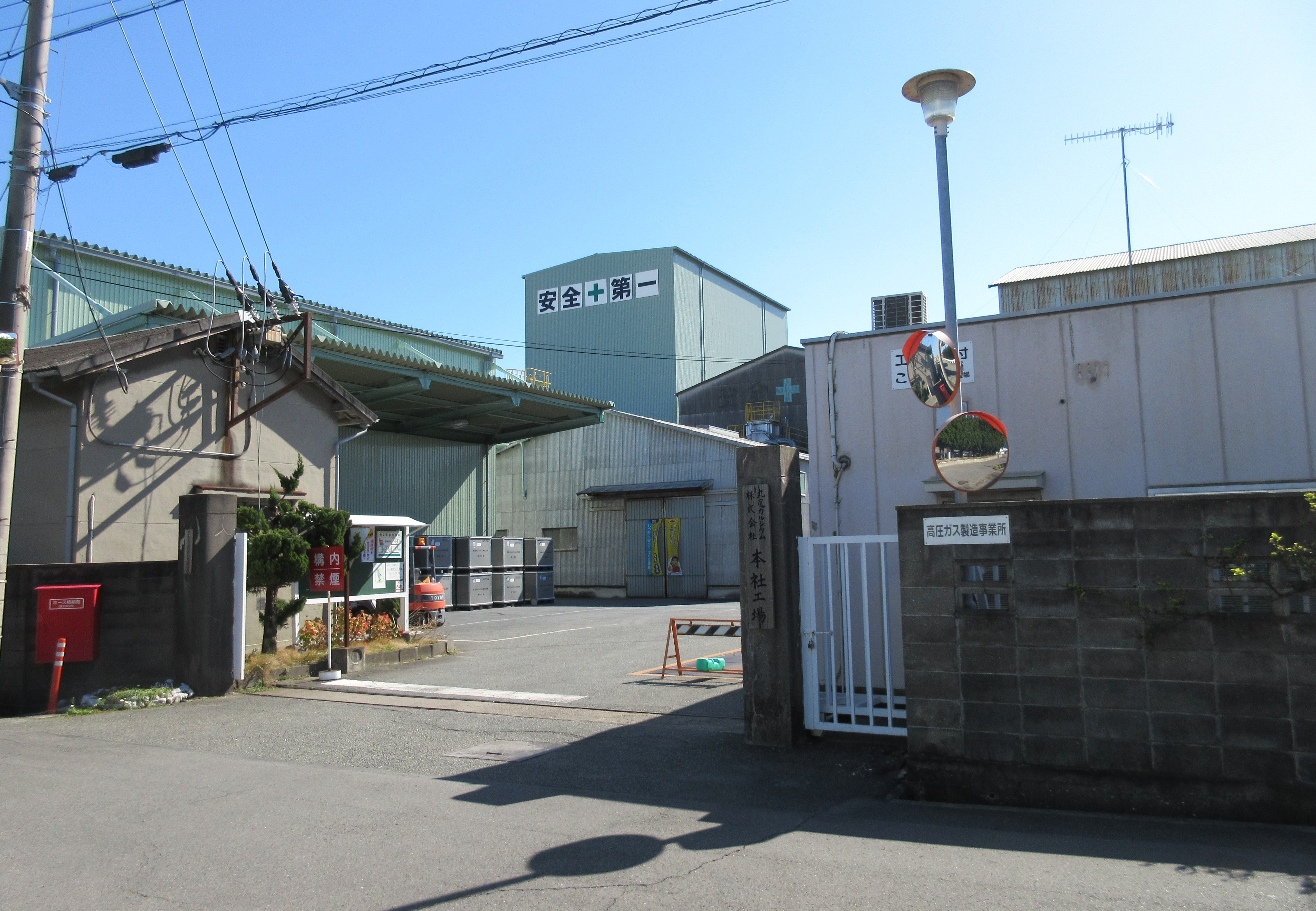 丸尾カルシウム本店・本社工場